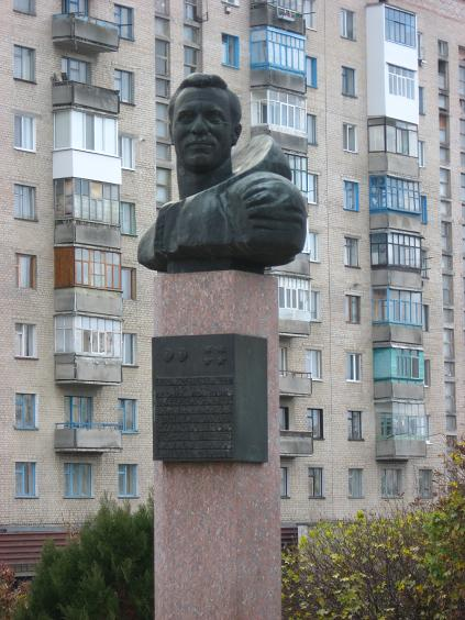 Олександрія, пам'ятник Л. І. Попову – льотчику-космонавту, двічі Герою Радянського Союзу